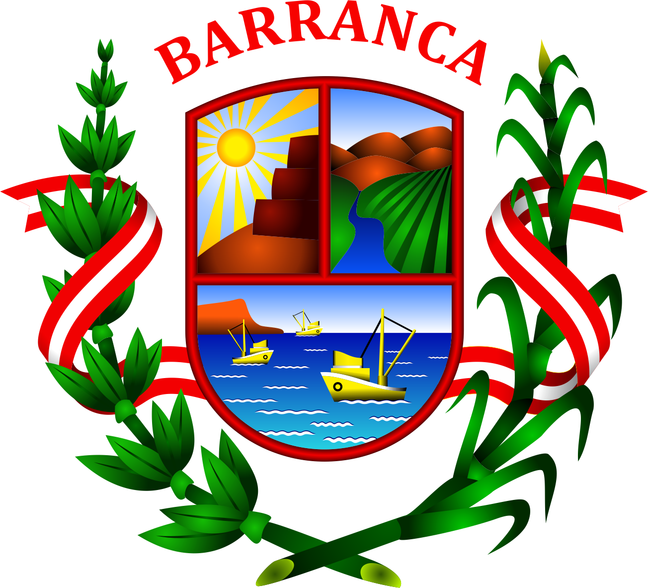 Distrito de Barranca - Provincia de Barranca - Región Lima